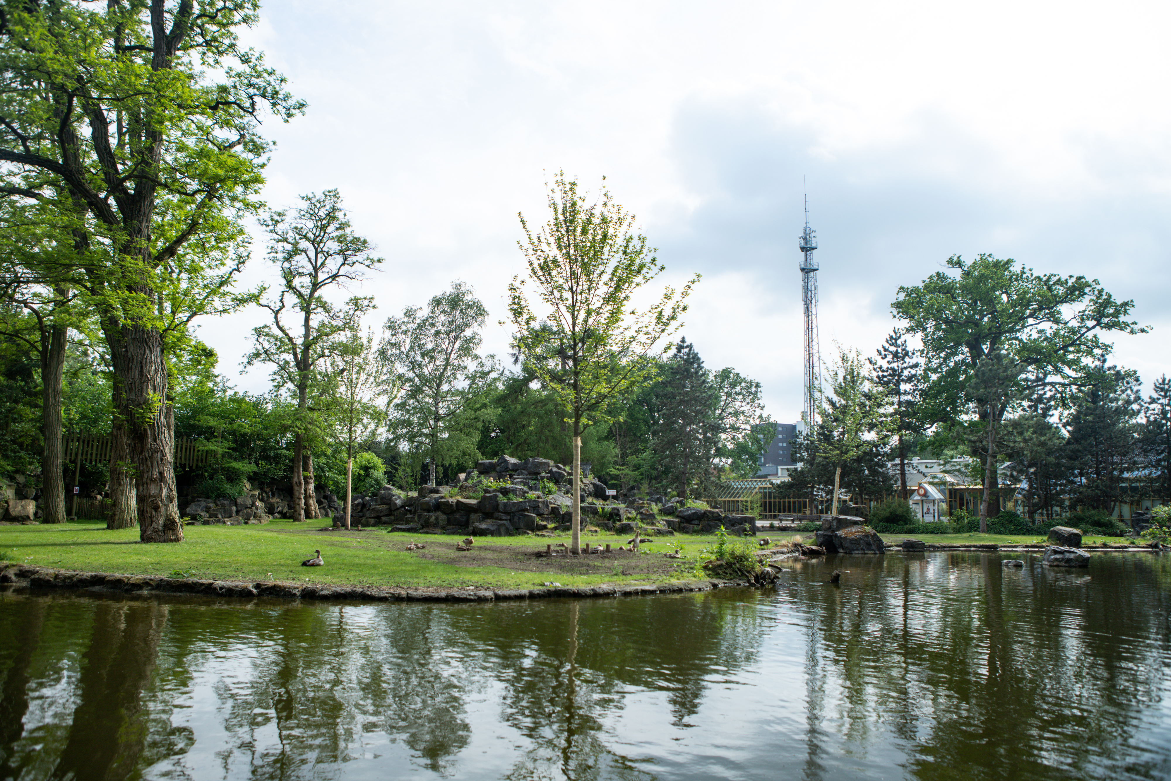 Rensenpark in 2019